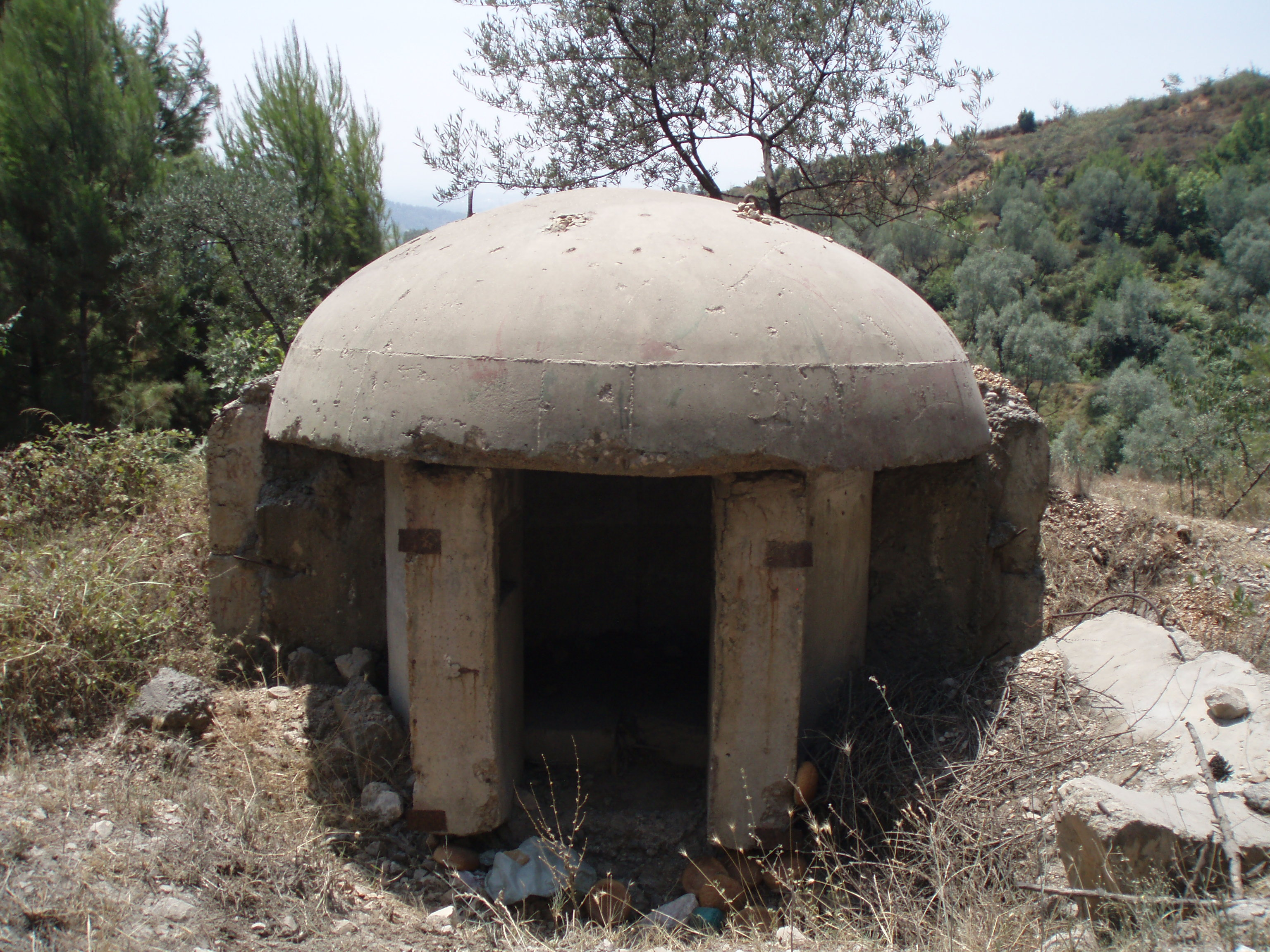 Bunker near Kruja in Albania.